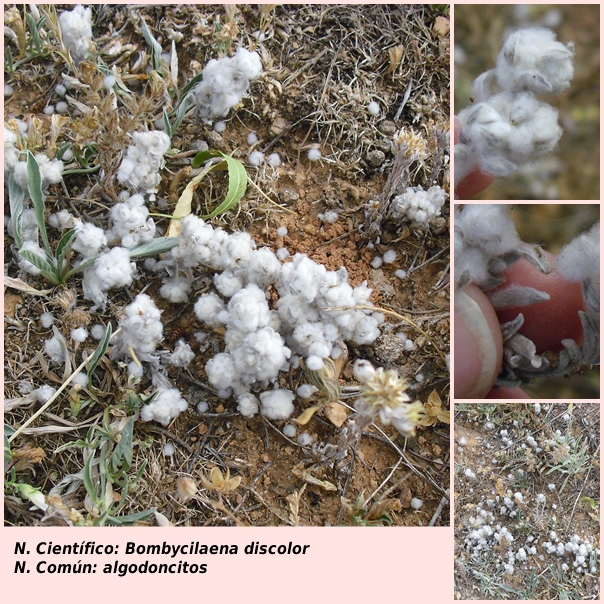 algodoncillos